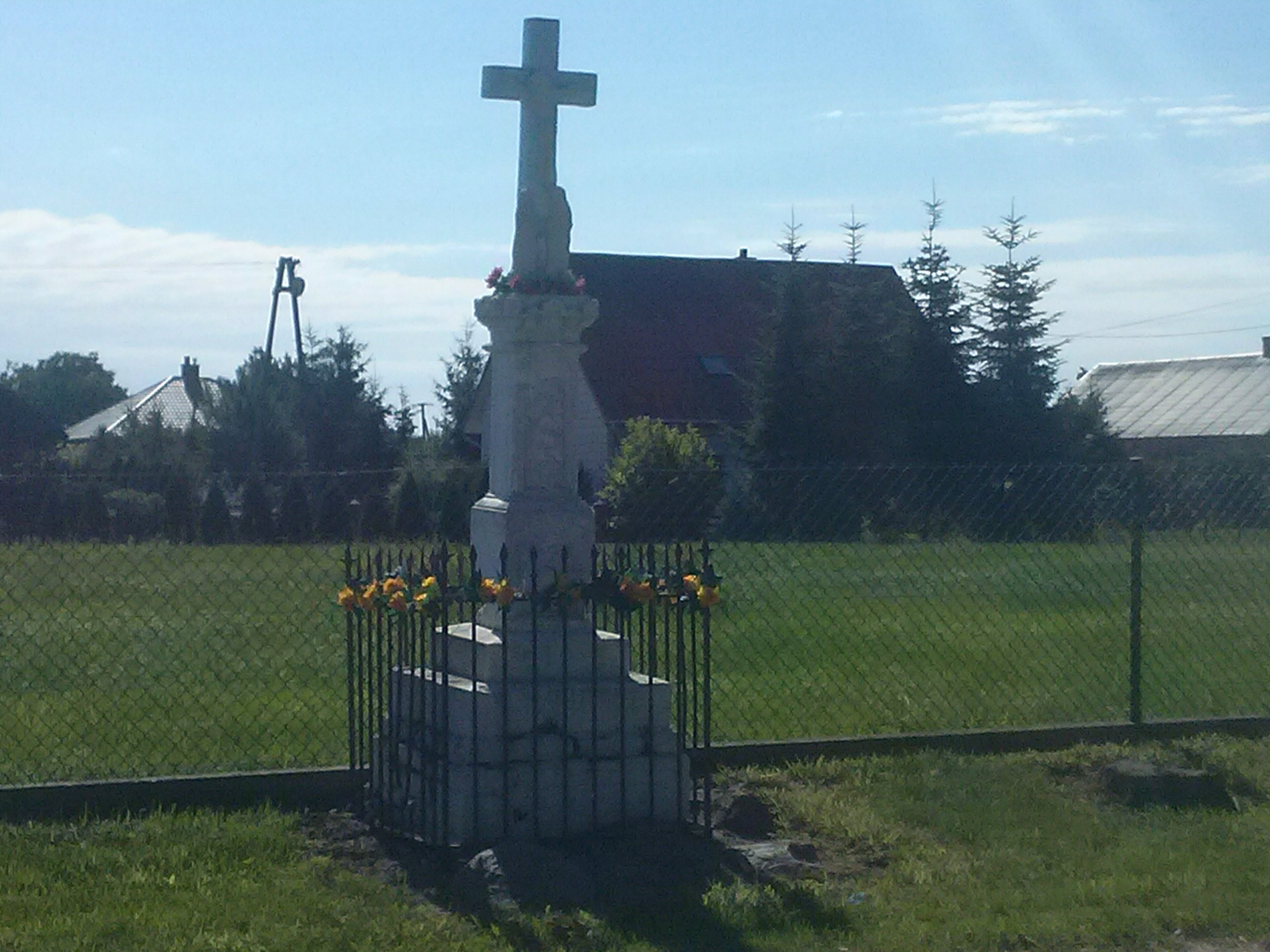 Figurka Krzyża Świętego w Leżachowie, obok Wiejskiego Domu Kultury